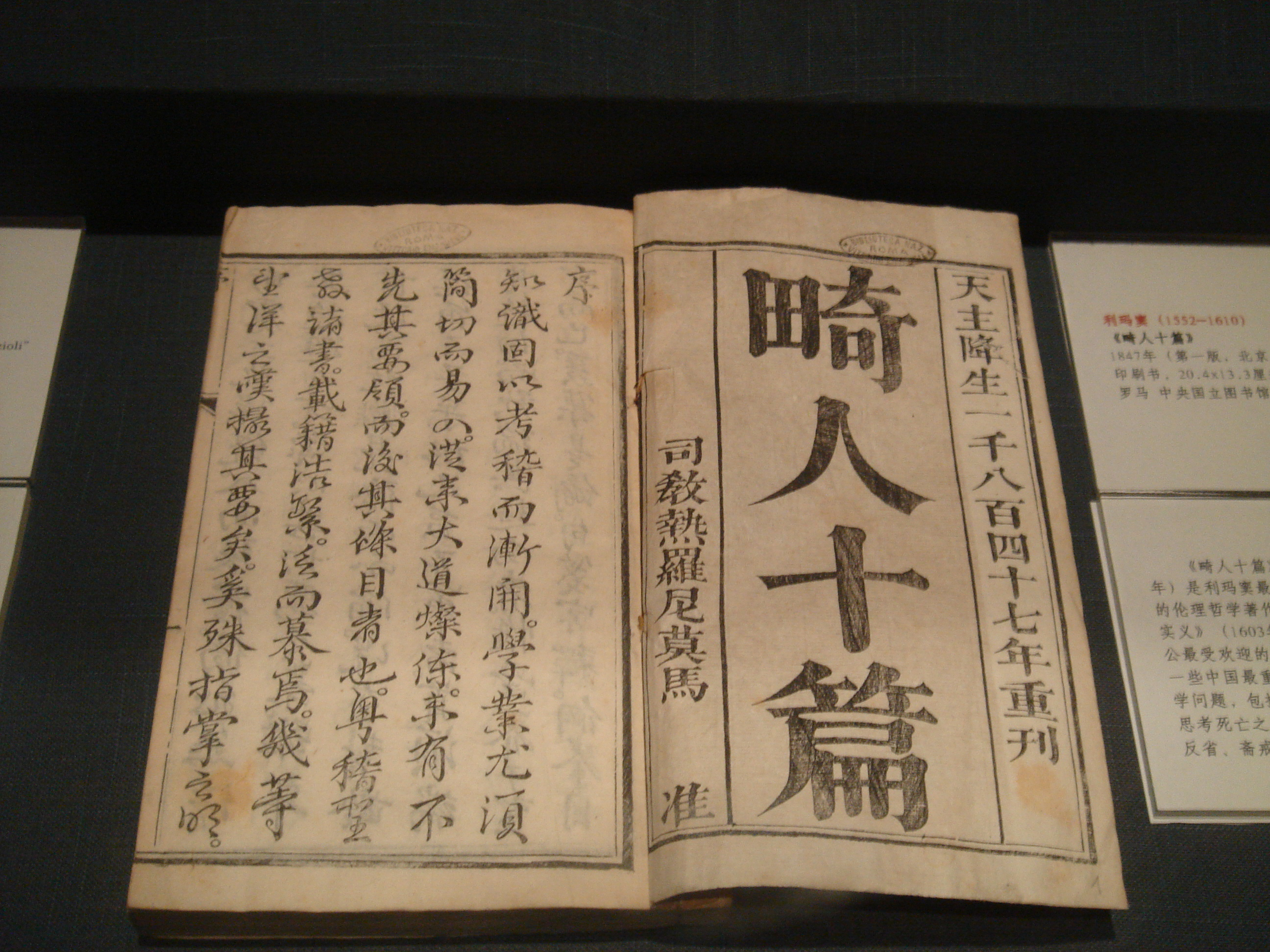 《畸人十篇》1847年印刷书，利玛窦译，1608年第一版，藏于罗马中央国立图书馆，摄于北京首都博物馆